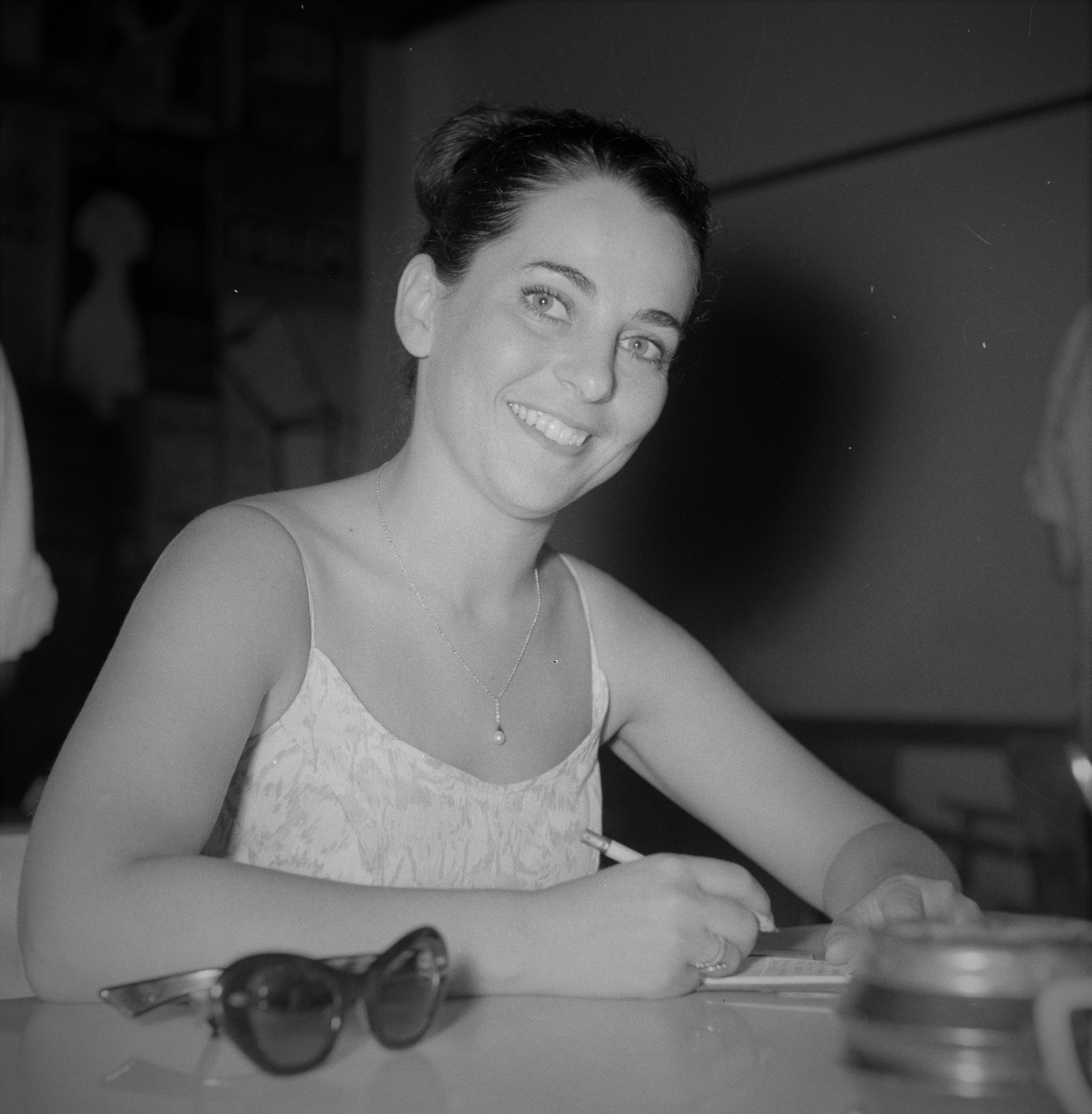 Collectie / Archief : Fotocollectie Van de Poll Reportage / Serie : [ onbekend ] Beschrijving : Portret van de actrice Dina Doron van het toneelgezelschap Habima in de kantine tijdens een repetitie Datum : 1964 Locatie : Israël Trefwoorden : acteurs, cafés, repetities, toneelgezelschappen Persoonsnaam : Doron, Dina Fotograaf : Poll, Willem van de, [onbekend] Auteursrechthebbende : Nationaal Archief Materiaalsoort : Negatief (zwart/wit) Nummer archiefinventaris : bekijk toegang 2.24.14.02 Bestanddeelnummer : 255-4539